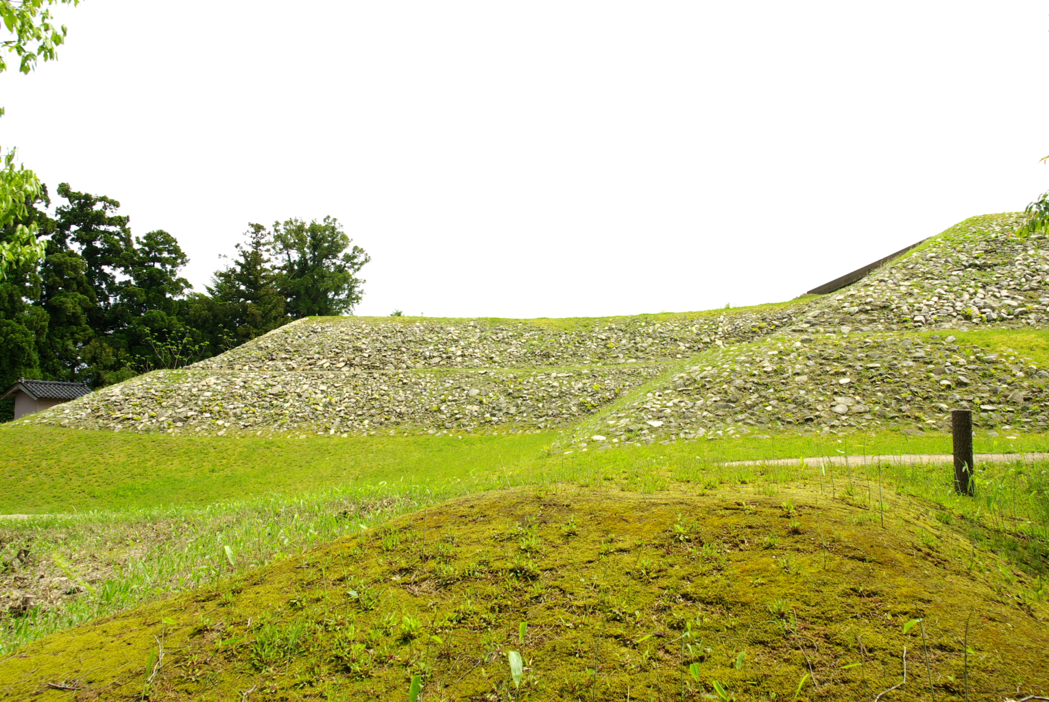 雨の宮1号墳前方部